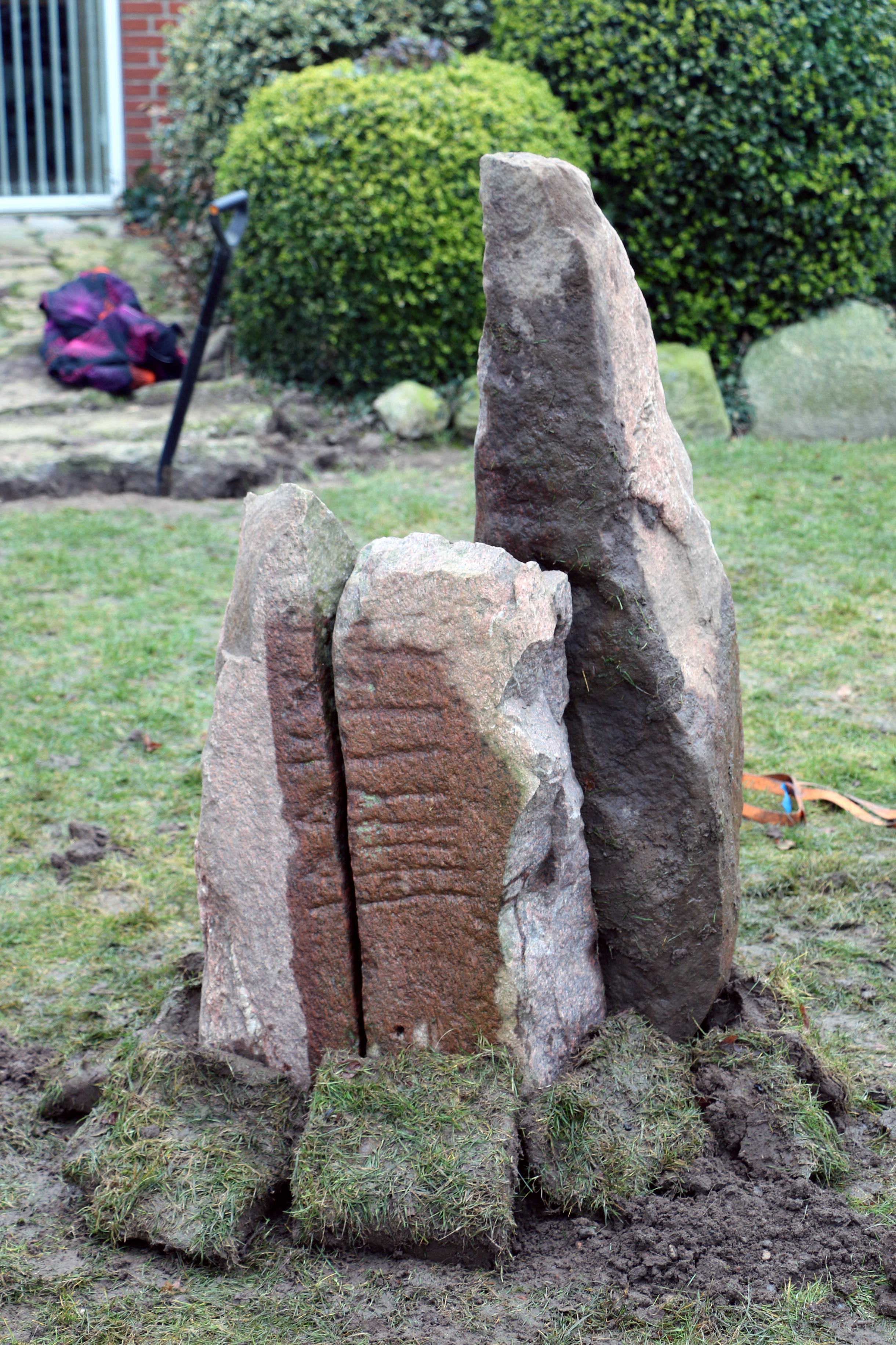 Ydby-runestenen genrejst. Troels-siden